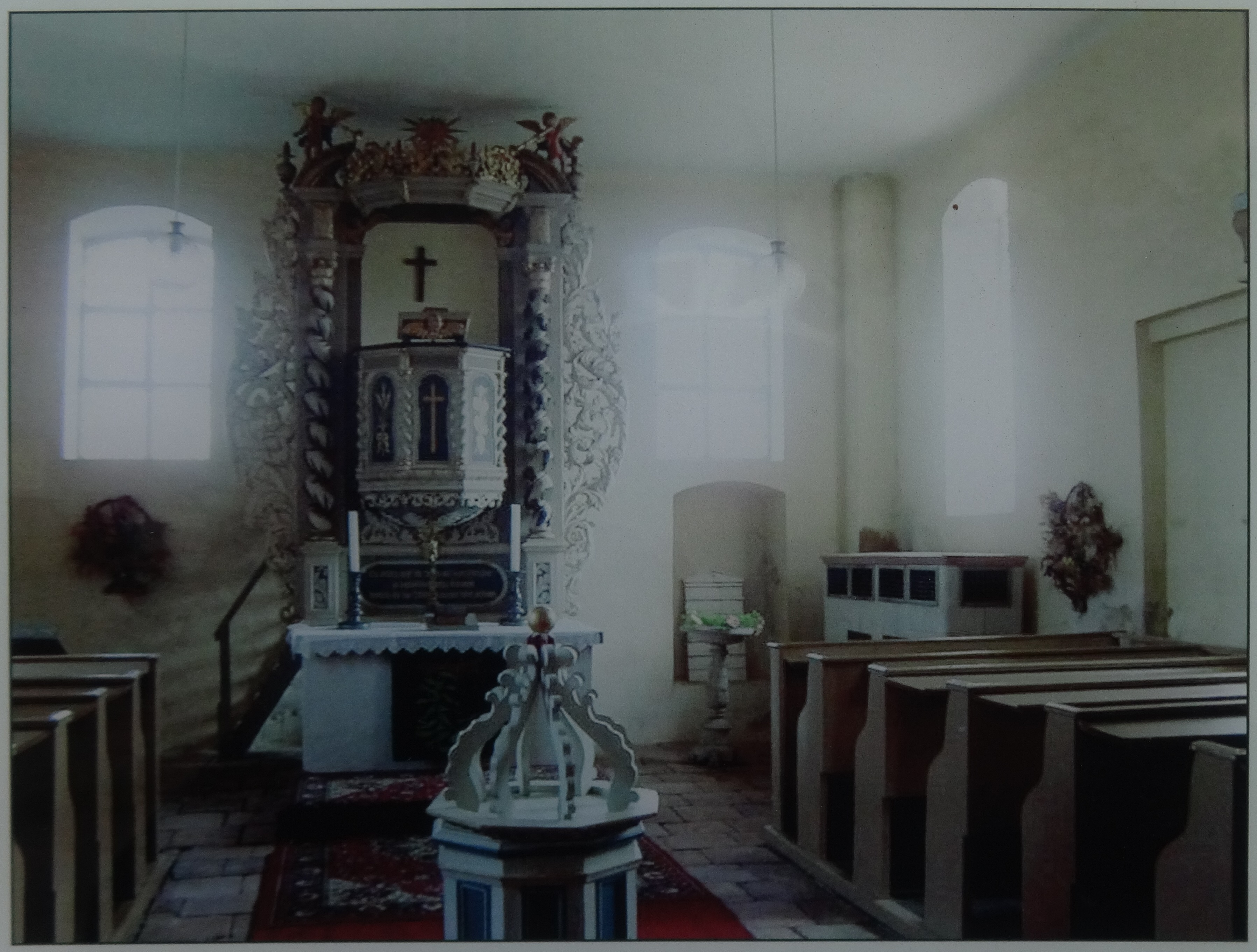 Die Dorfkirche Derwitz ist eine mittelalterliche Feldsteinkirche aus der Zeit um 1500. Im Innern befinden sich unter anderem ein Kanzelaltar, der auf das Jahr 1716 signiert ist sowie eine Orgel aus dem zweiten Viertel des 19. Jahrhunderts. Sie steht in Derwitz, einem Ortsteil der Stadt Werder (Havel) in Brandenburg. Aufnahme von einer öffentlich zugänglichen Informationstafel an der Kirche